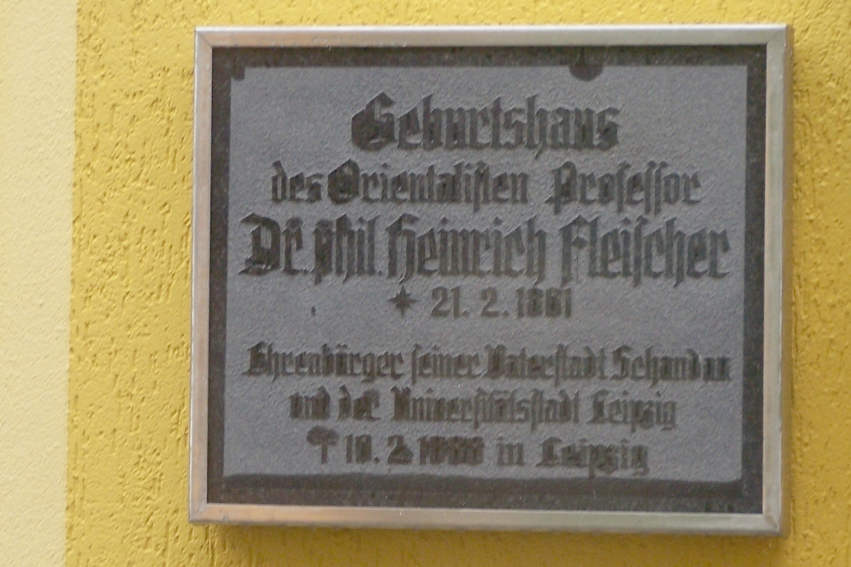 Gedenktafel für den Bad Schandauer Ehrenbürger Prof. Heinrich Fleischer